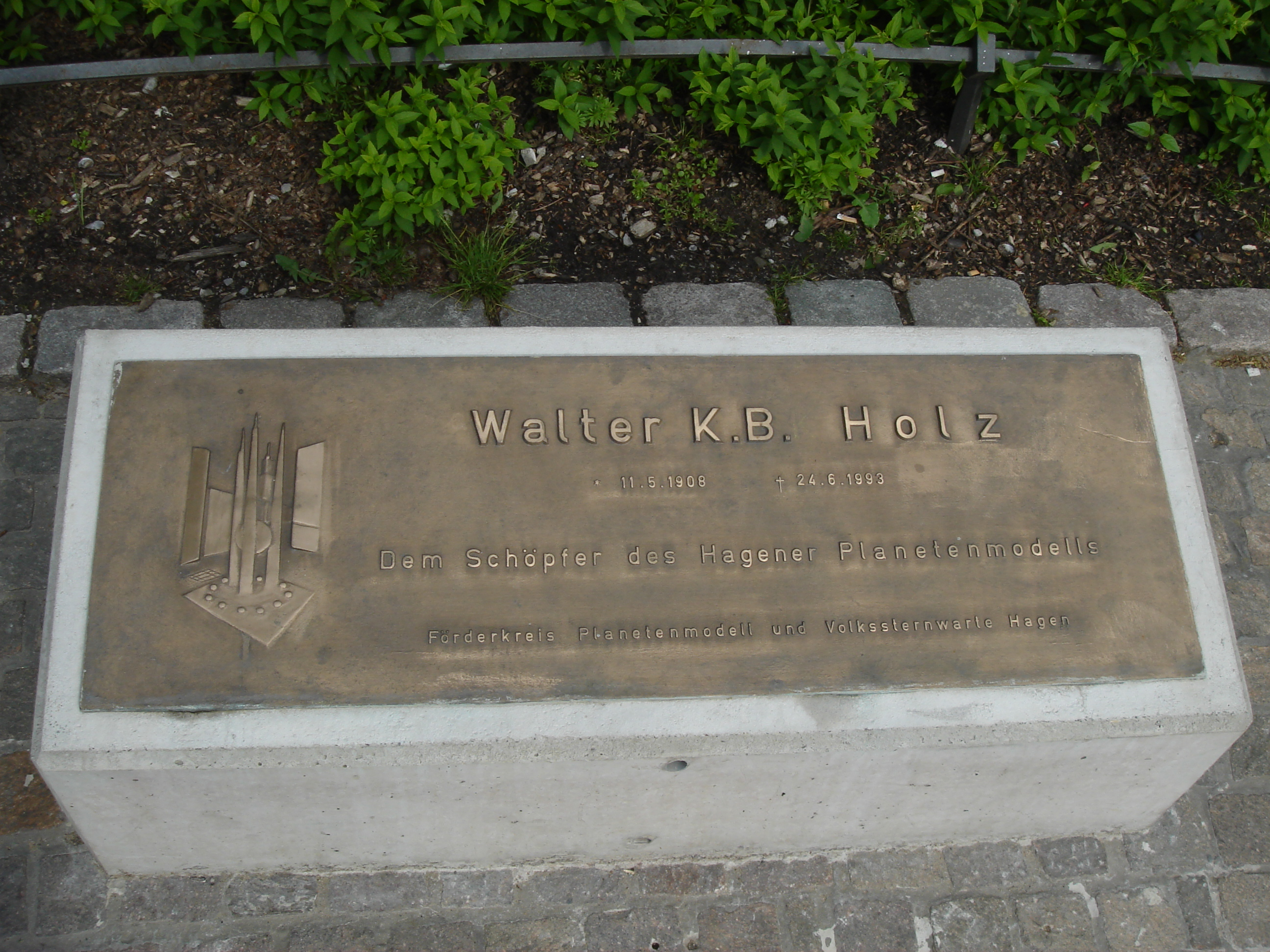 Eine Hinweistafel zum Planetenmodell von Hagen.